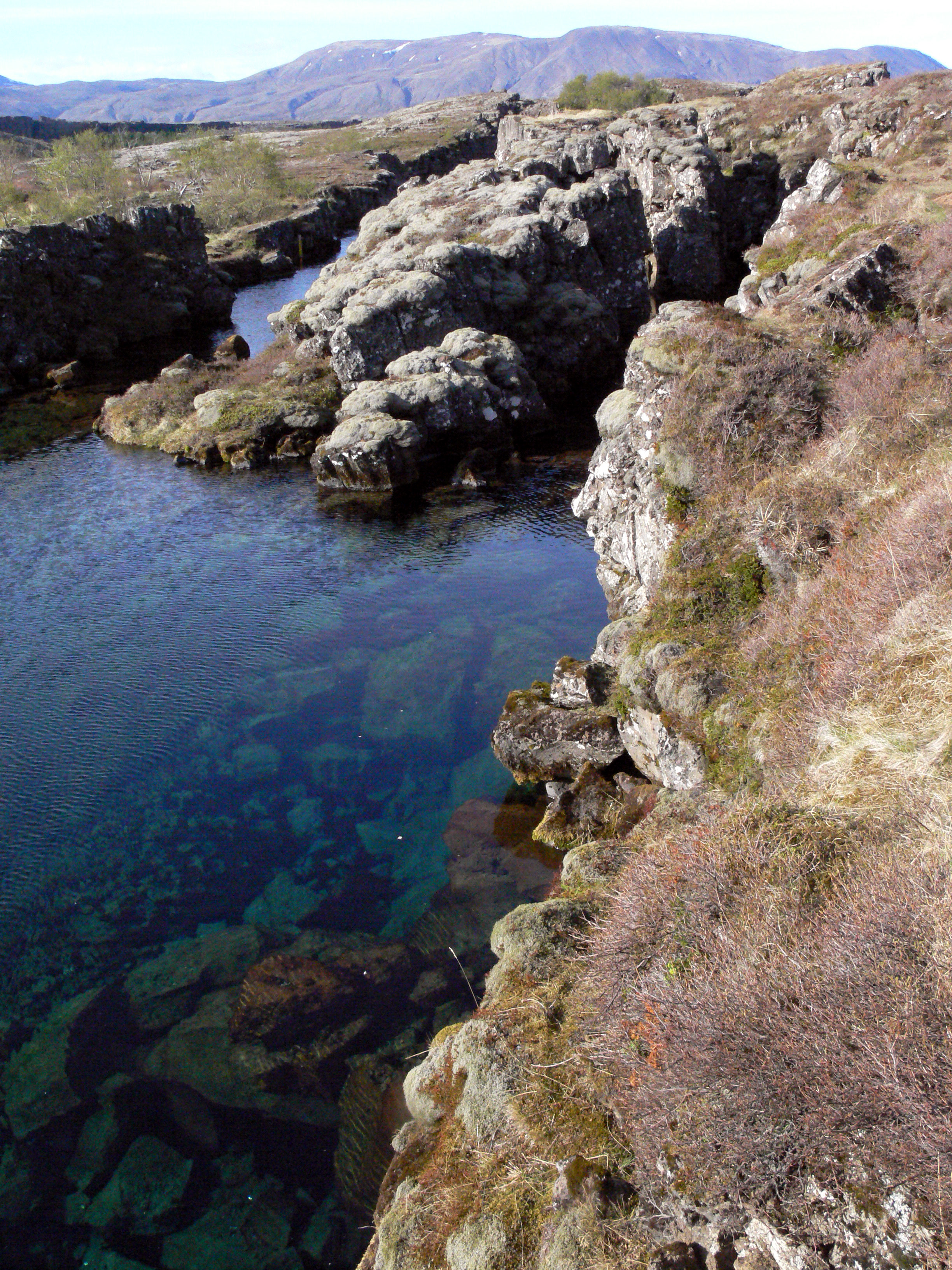 Þingvellir